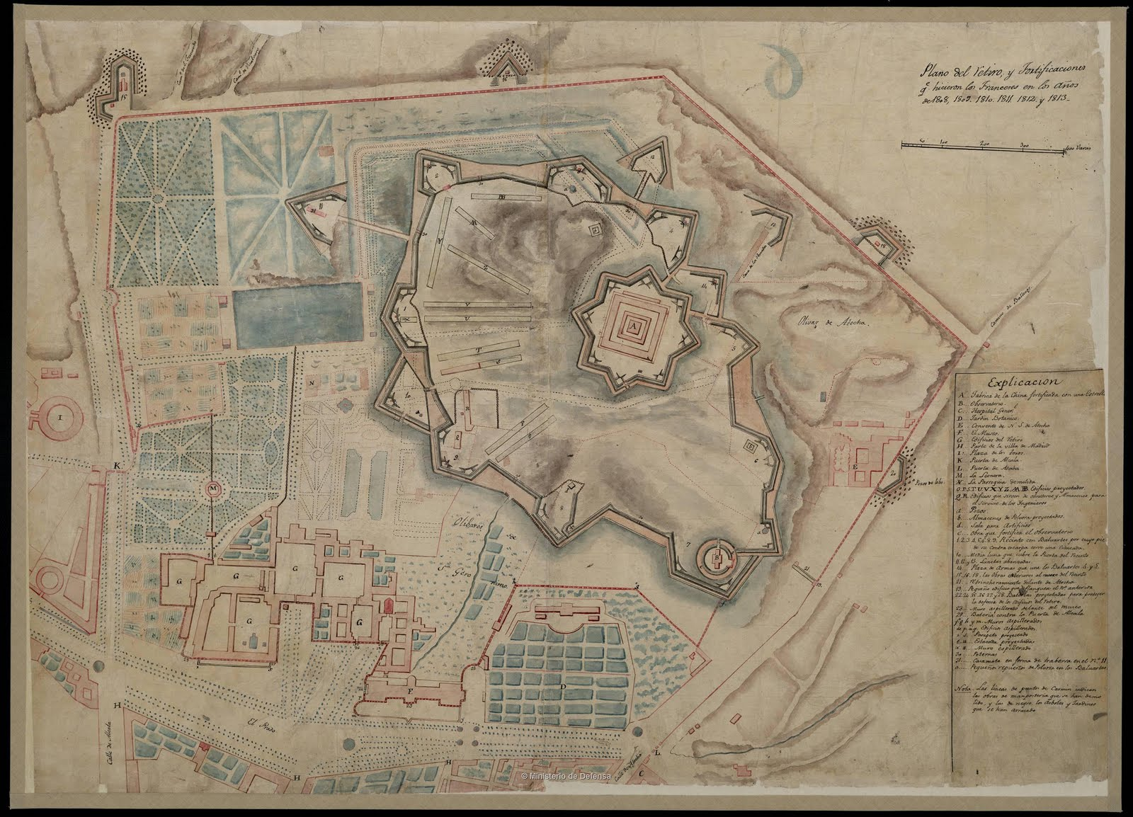 Plan de la forteresse du Retiro à Madrid après les travaux effectués par les français entre 1808 et 1813.